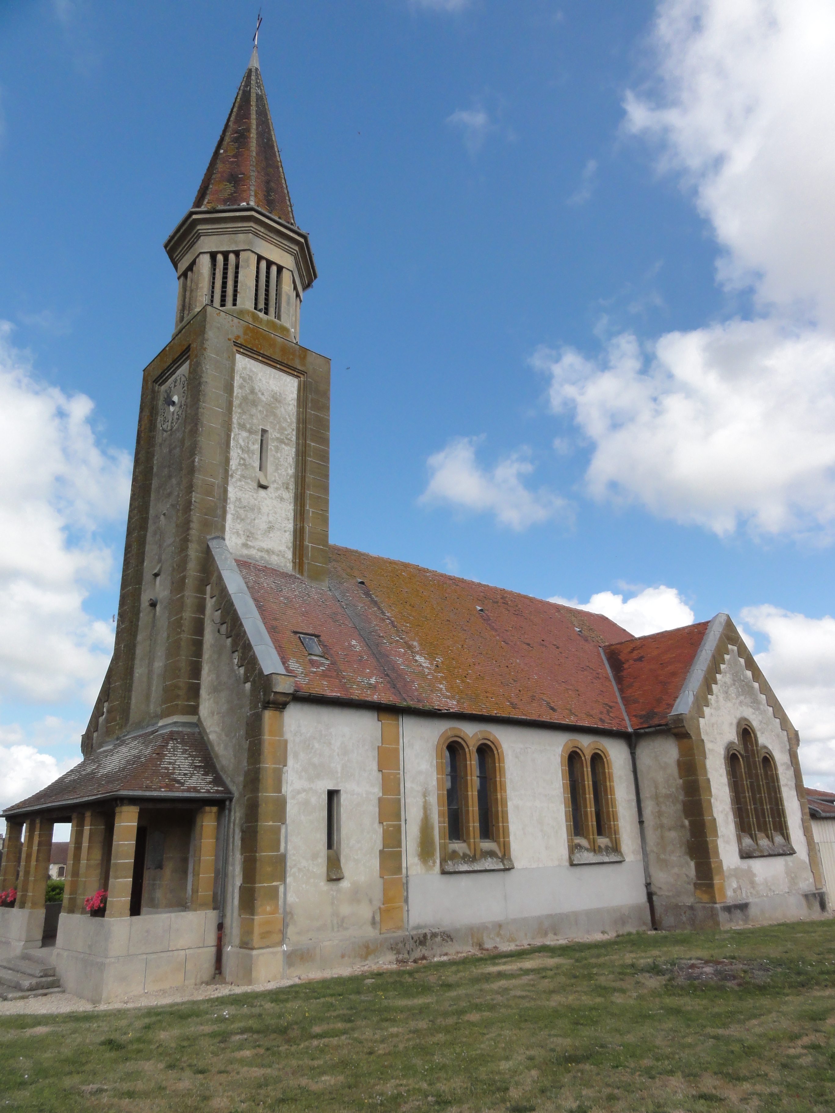 Proviseux-et-Plesnoy (Aisne) église de Proviseux